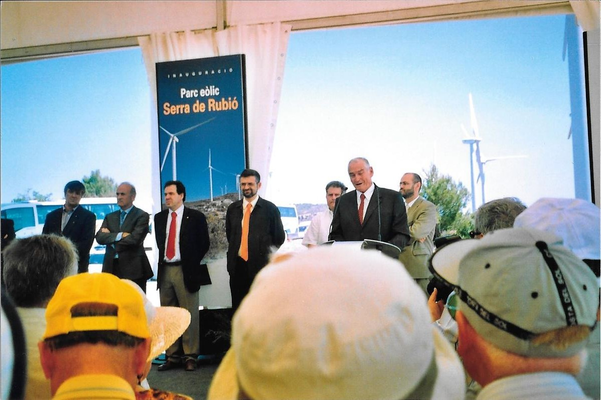 Presentació del Parc Eòlic de la Serra de Rubió, amb l'alcalde de Rubió Francesc Miquel Archela Gil (CiU) a la dreta de l'imatge.